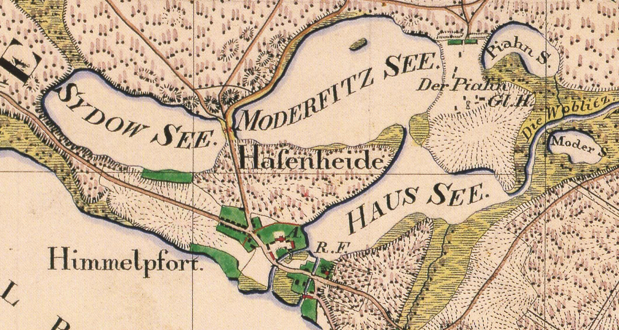 Himmelpfort, OT von Fürstenberg/Havel, Lkr. Oberhavel, Brandenburg, Ausschnitt aus dem Urmesstischblatt Blatt 2845 Bredereiche von 1825